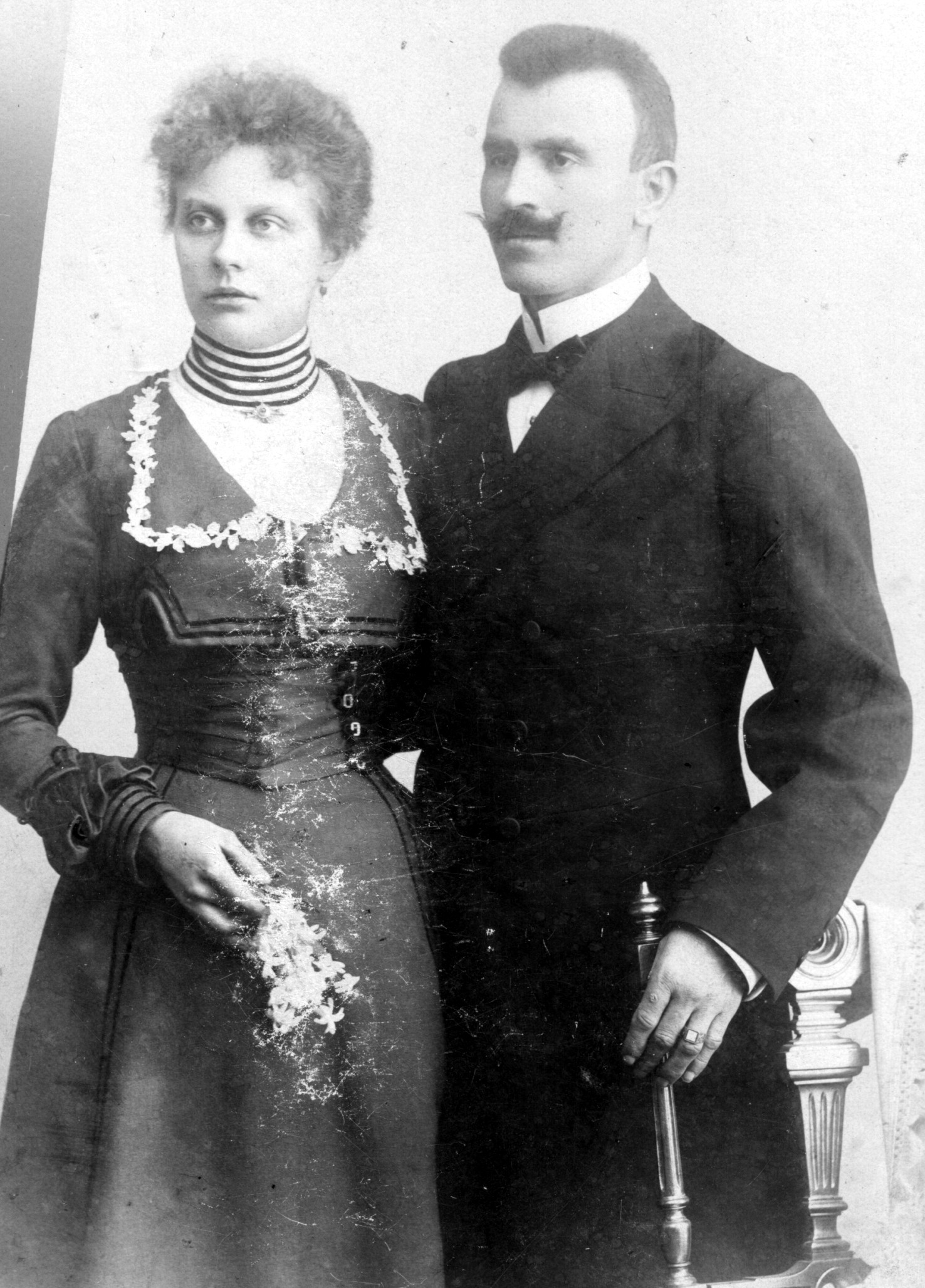 Helene von Rode, geb. Holtz (* 22. August 1863; † 27 August 1902), 1. Ehefrau von Georg von Rode (* 21. September 1857; † 6. Mai 1927). Undatiert.